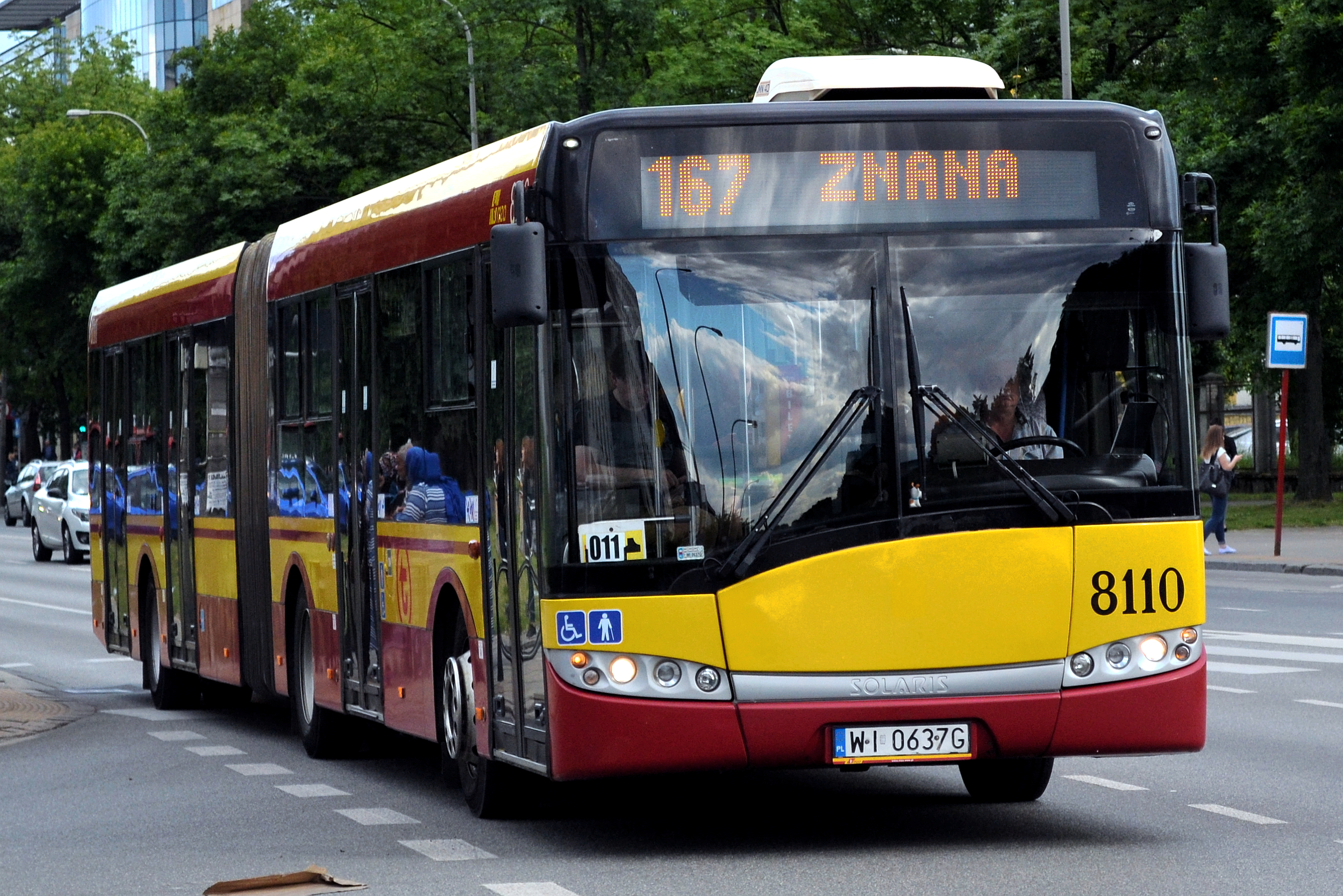 Solaris Urbino 18 #8110 zbliża się do przystanku Szczęśliwicka